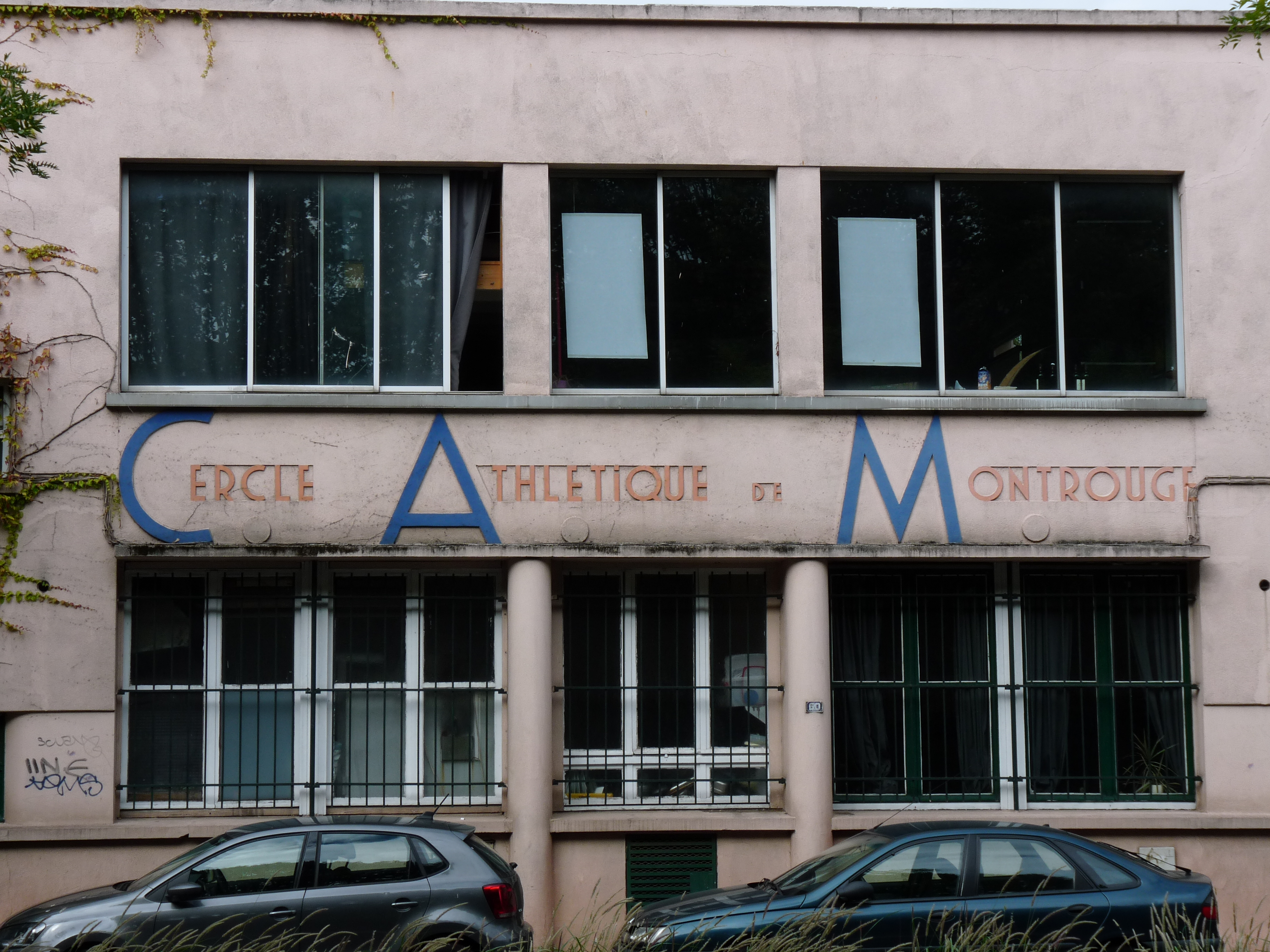 Bâtiment du Cercle Athlétique de Montrouge, vu depuis l'avenue Marx-Dormoy